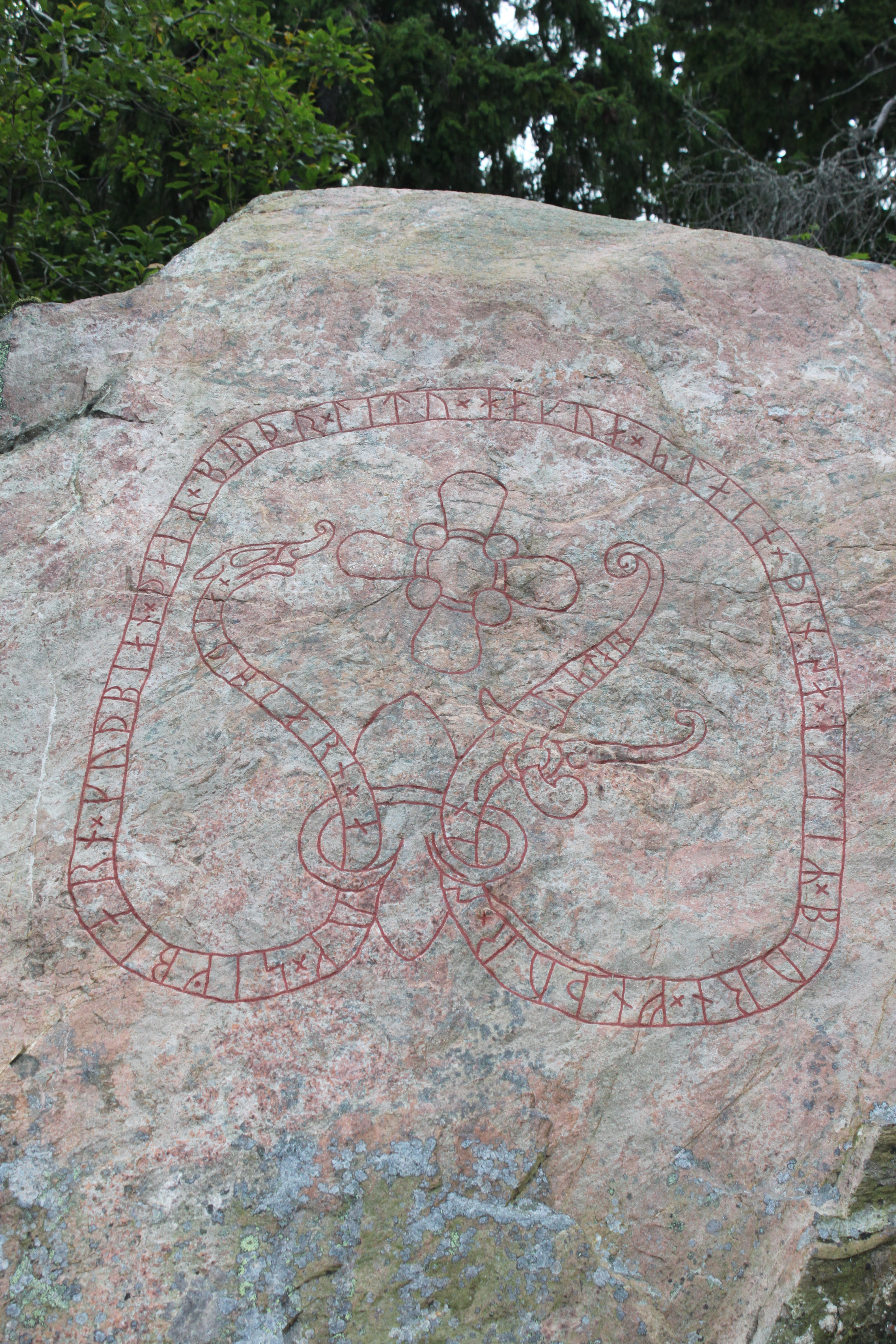 Södertälje 22:1. Runristning (Sö 344). Fast fornlämning.